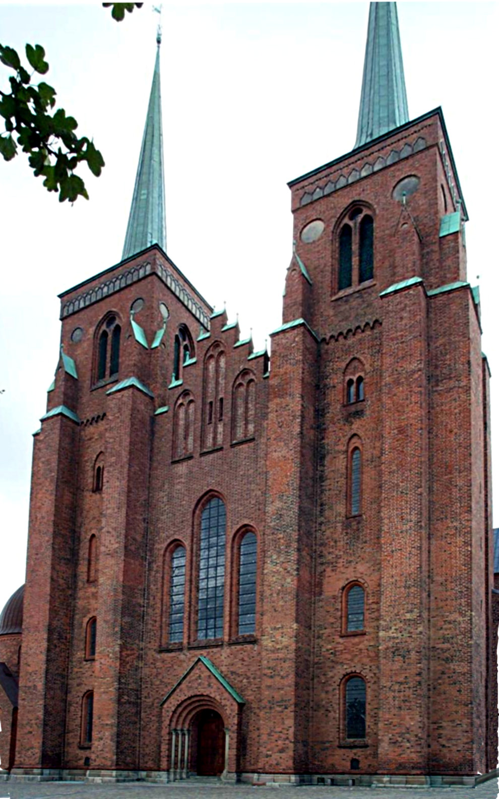 Roskilde domkirke, west fassade, 11. August 2004.